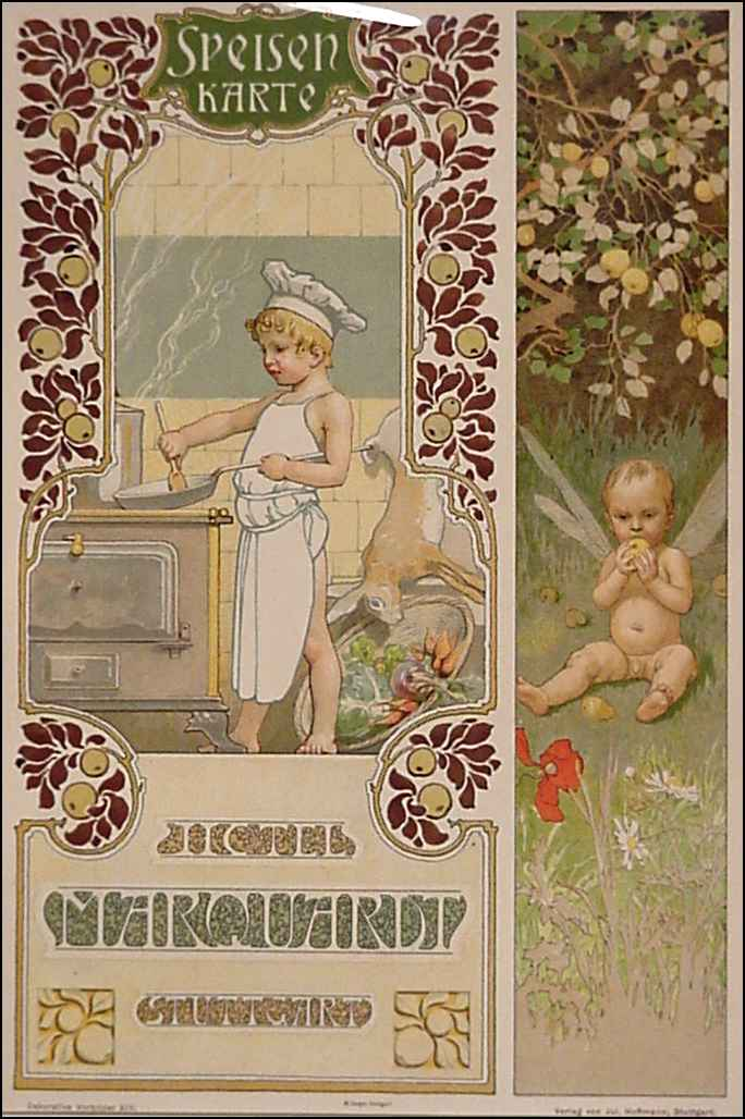 Speisekarte des Hotel Marquardt, Art Deco, Chromolithographie